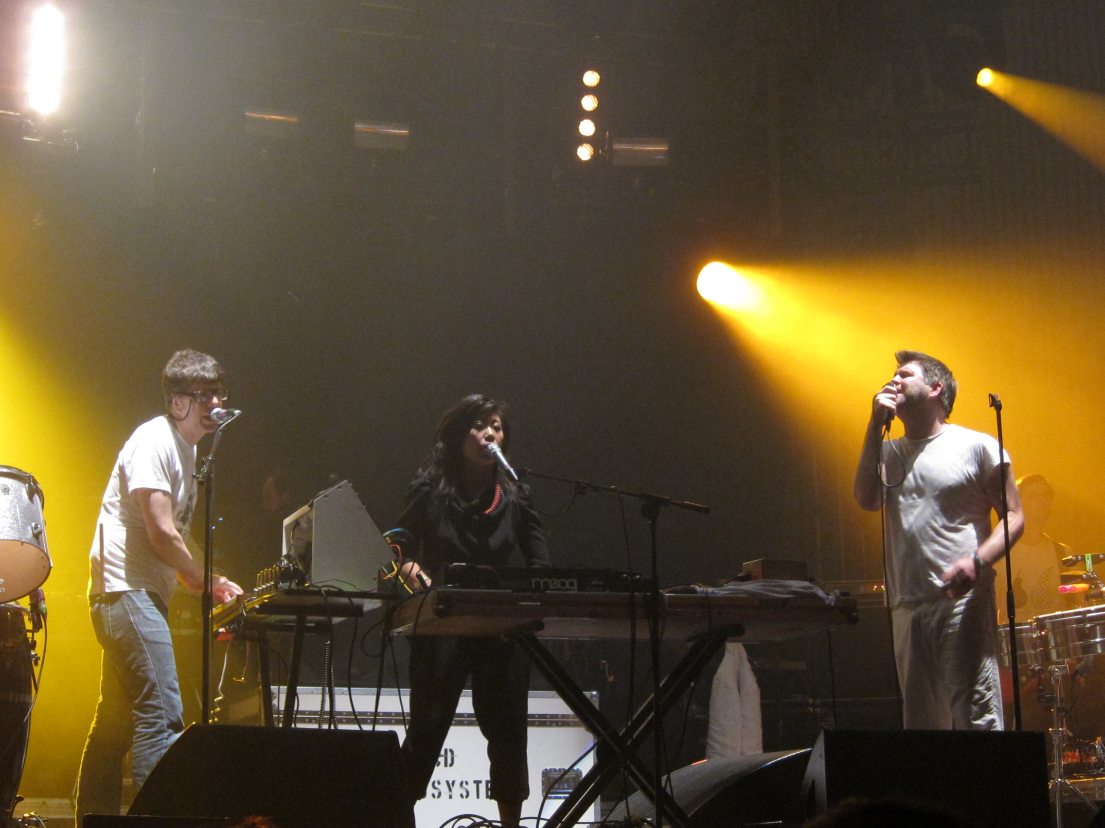 Sónar Galicia Corunha 17-19 Jun 2010